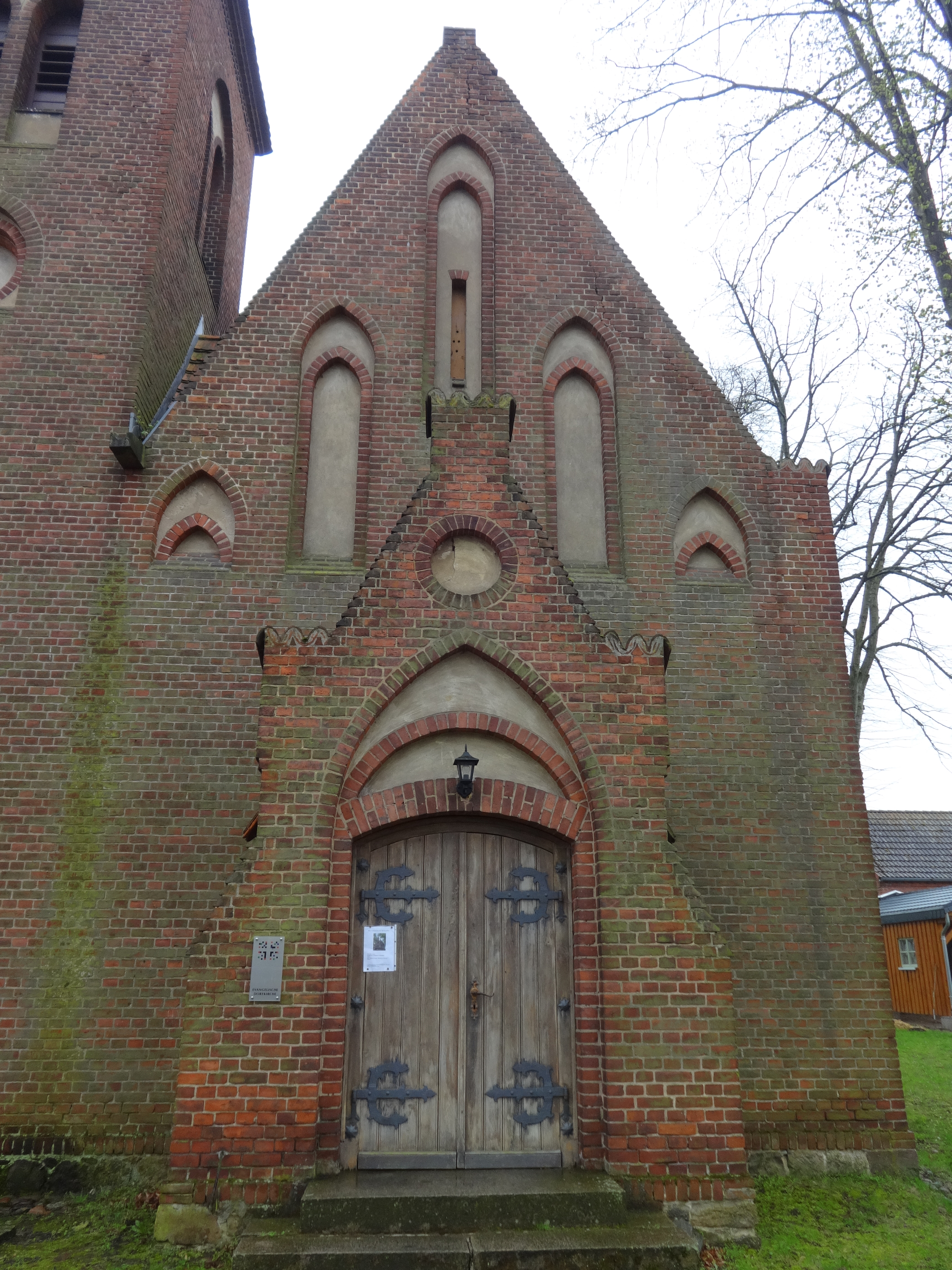 Die Dorfkirche in Rottstock ist eine neugotische Saalkirche in Rottstock, einem Ortsteil der Gemeinde Gräben im Landkreis Potsdam-Mittelmark in Brandenburg. Auffällig ist der an der Nordseite asymmetrisch positionierte Turm.